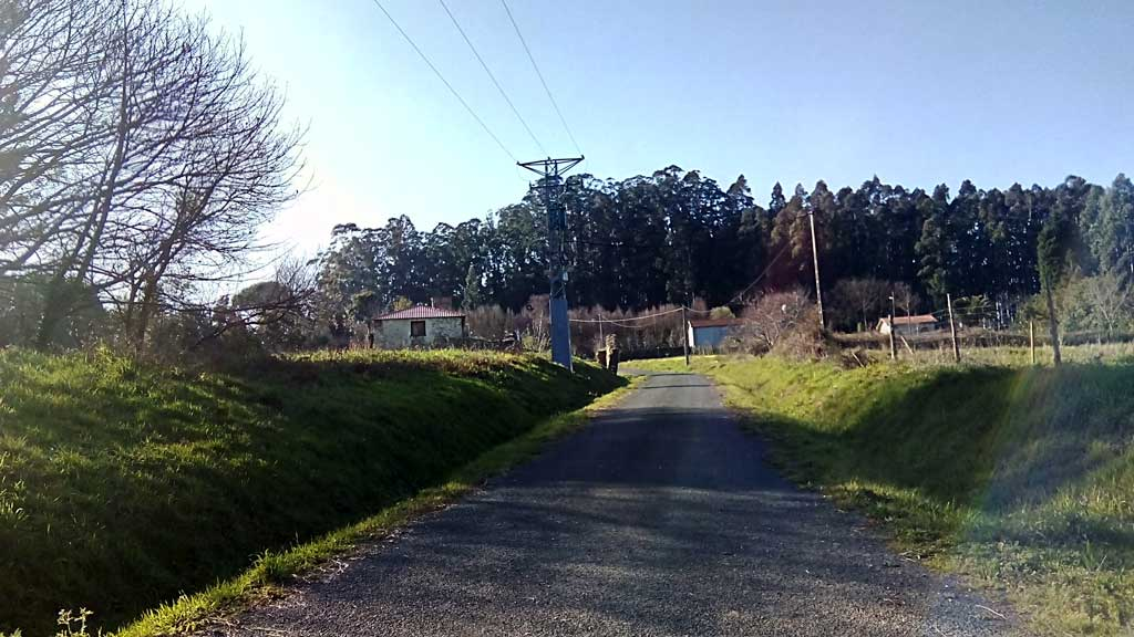 Vista do Camiño, Sedes.